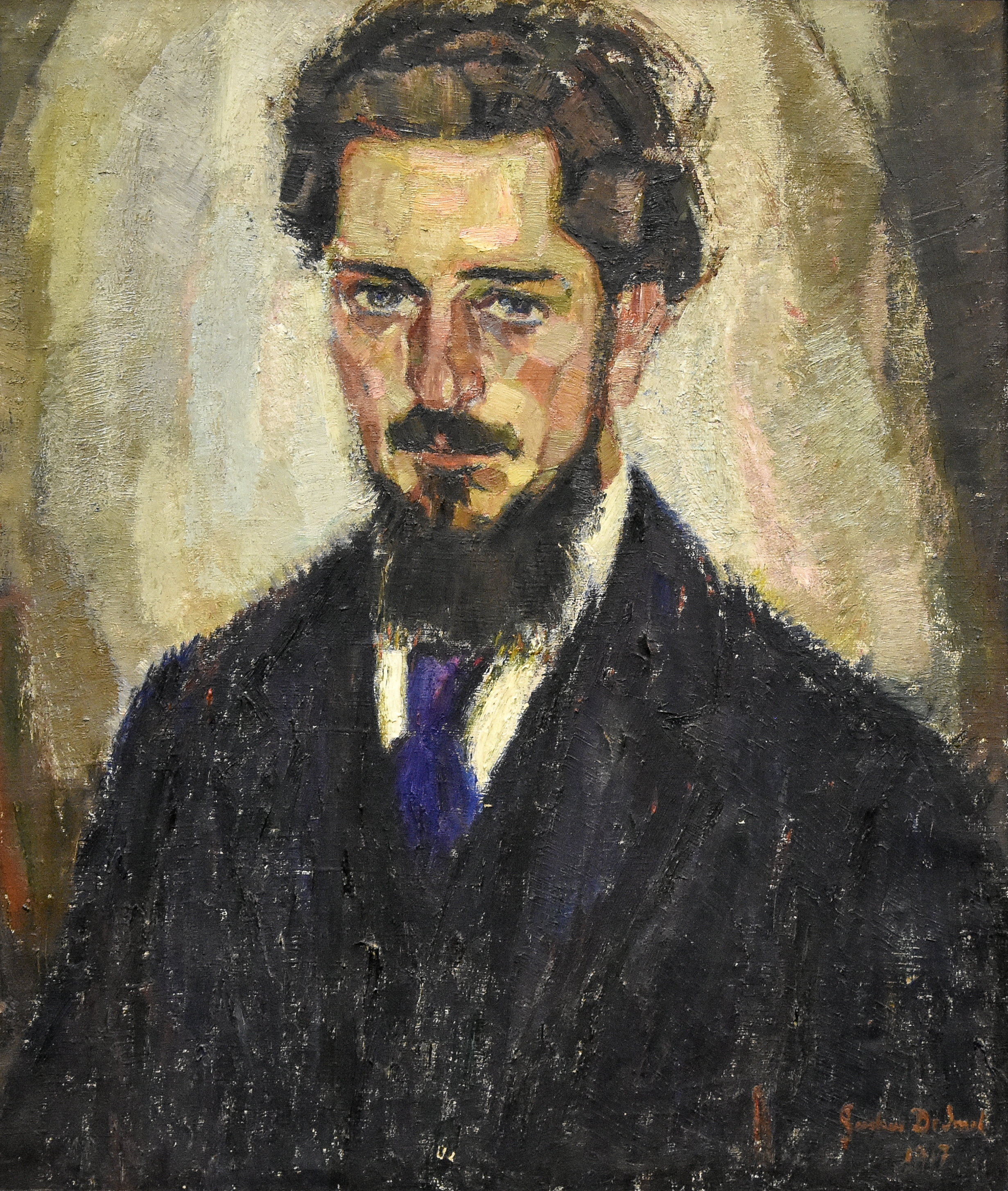 Gustave De Smet (1877-1943) Portret van Leo Van Puyvelde (1917) MSK Gent